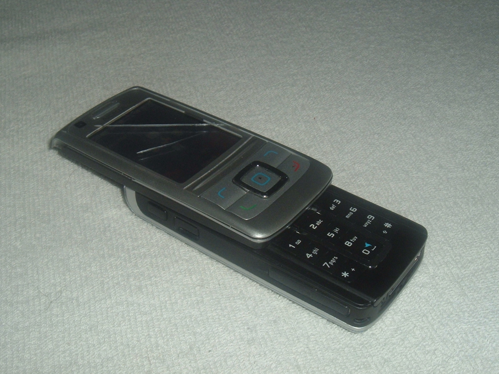 Nokia 6280 open.